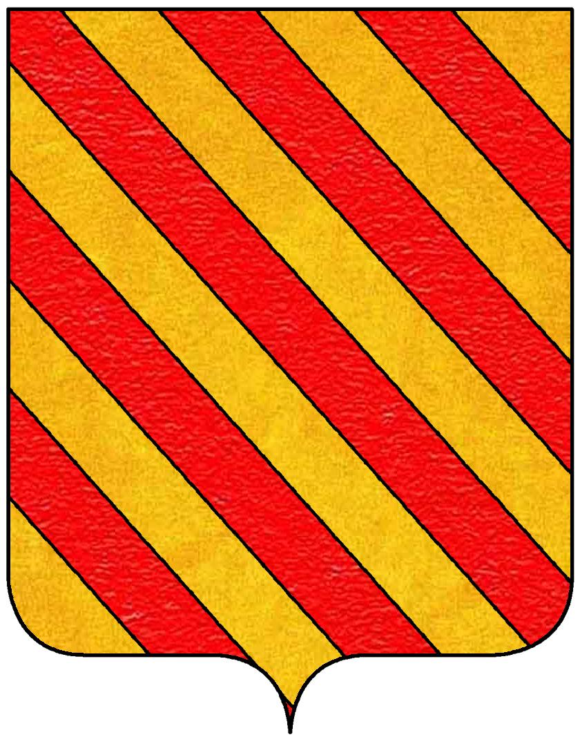 Stemma della famiglia Del Carretto